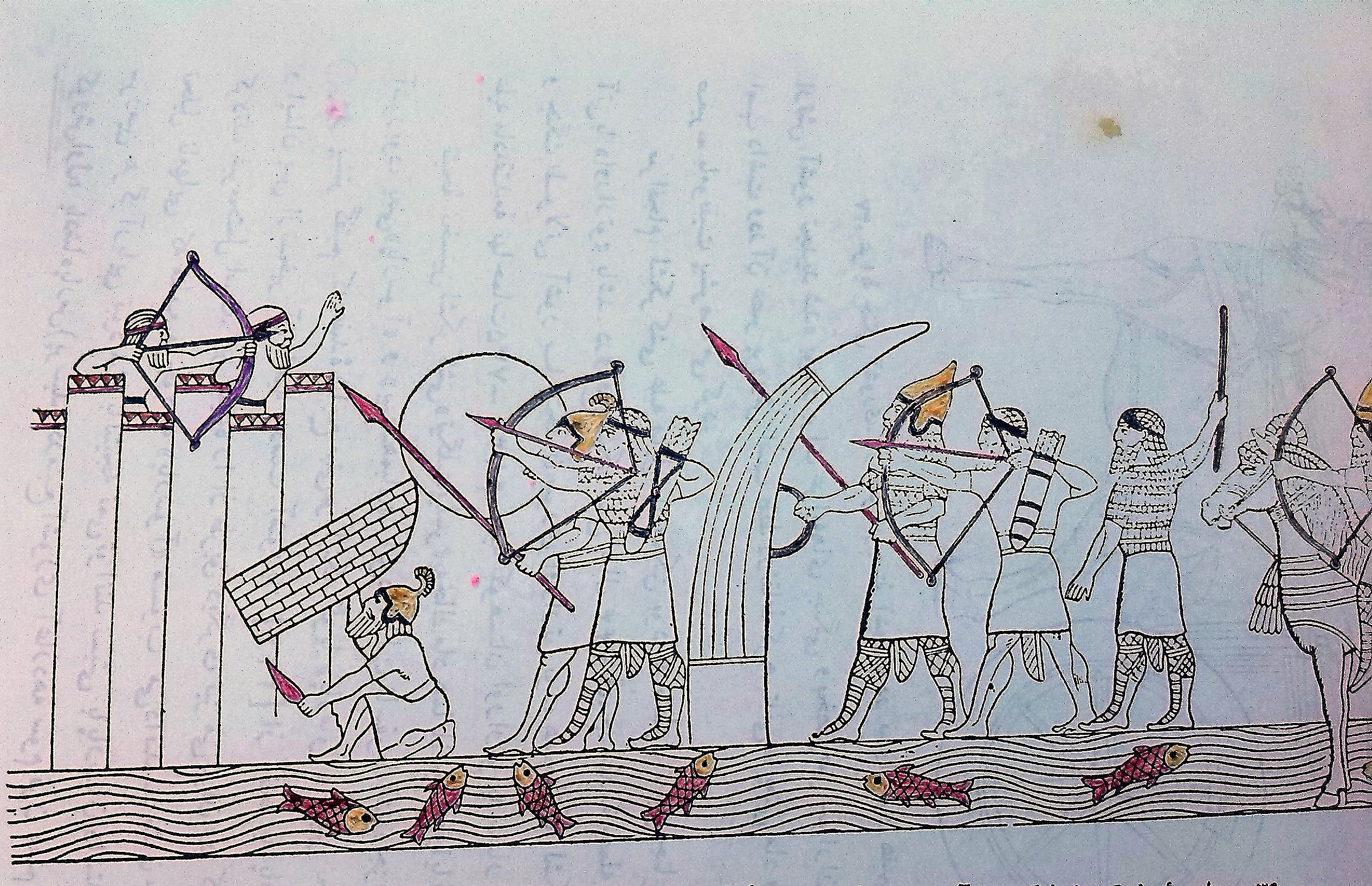 محاصره یکی از قلاع مادی پیش از تاسیس پادشاهی ماد توسط آشوریان